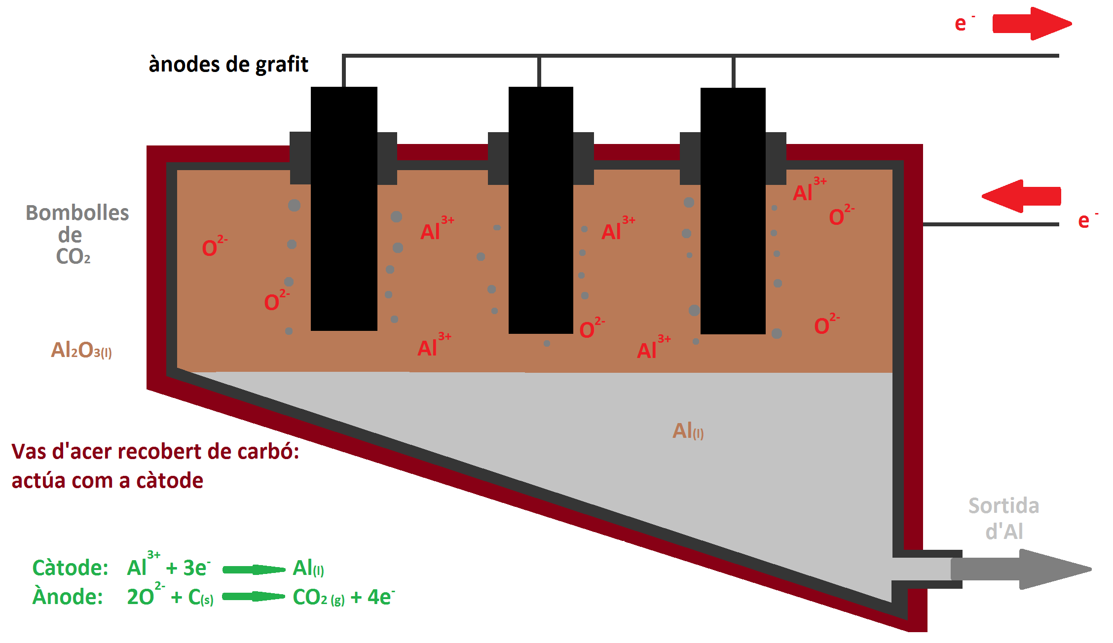 Transformació a Alumini.